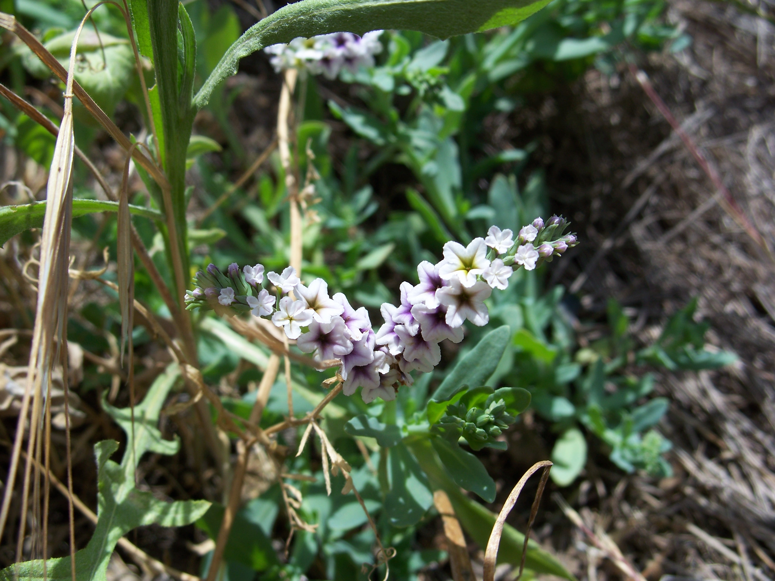 Heliotropium europaeum Made in Almaden Quicksilver County Park, San Jose, California, USA. Identified by Aroche.